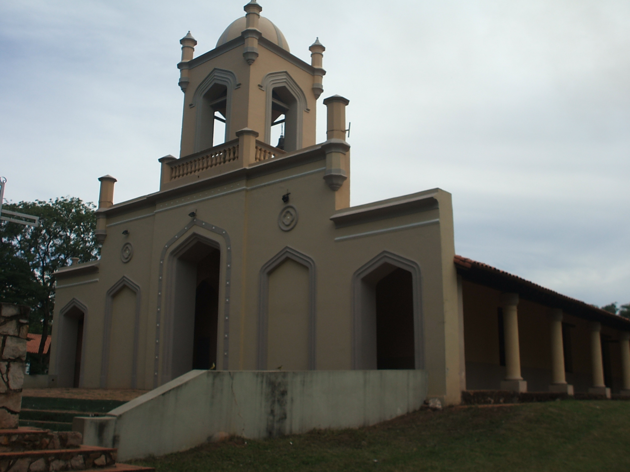 Tupao